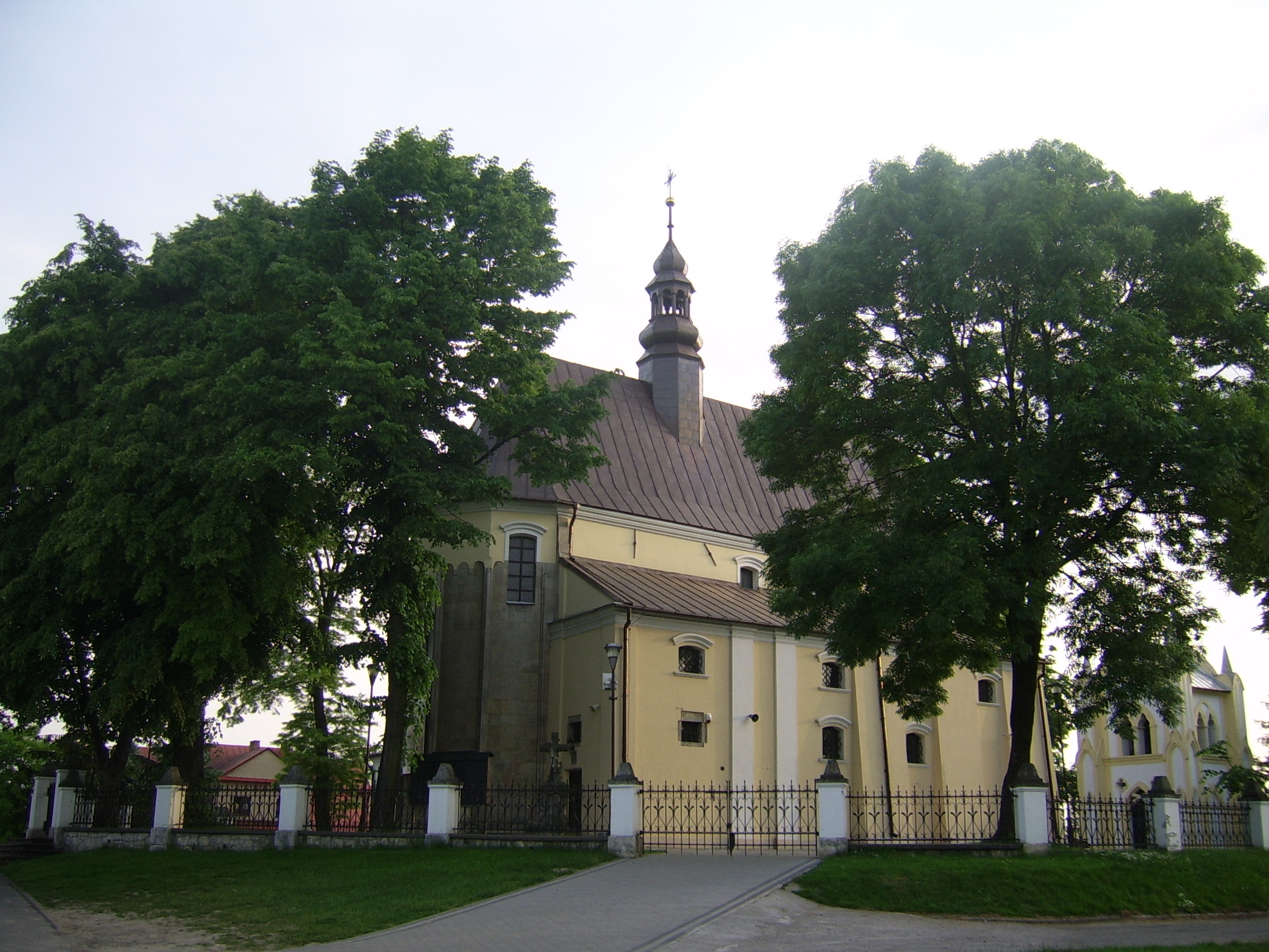 Kościelec (województwo małopolskie) - kościół pw. św. Wojciecha, widok od północnego-wschodu.